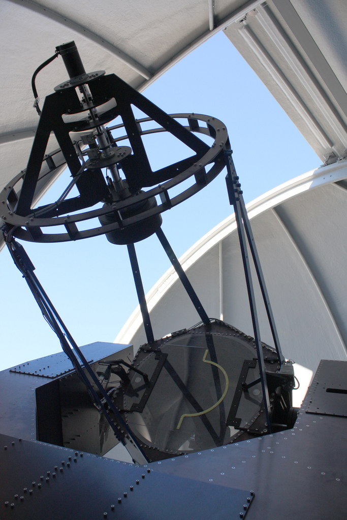 Observatori Astronòmic del Montsec, Parc Astronòmic del Montsec